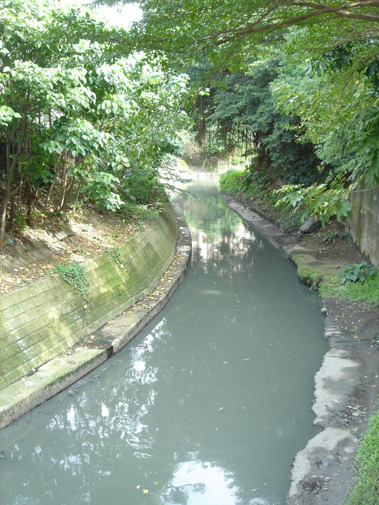 由台北縣中和市瓦磘里休閒廣場看過去的瓦磘溝。